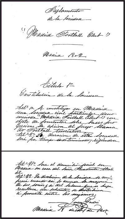 Exxtracto del acta fundacional del Real Madrid en 1902